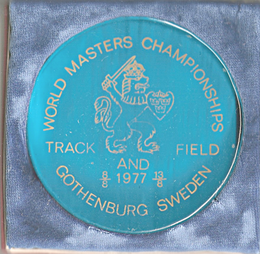 mistrovství světa veteránů v atletice 1977